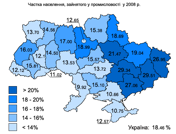 Зайнятість населення України у промисловості за даними 2008 року